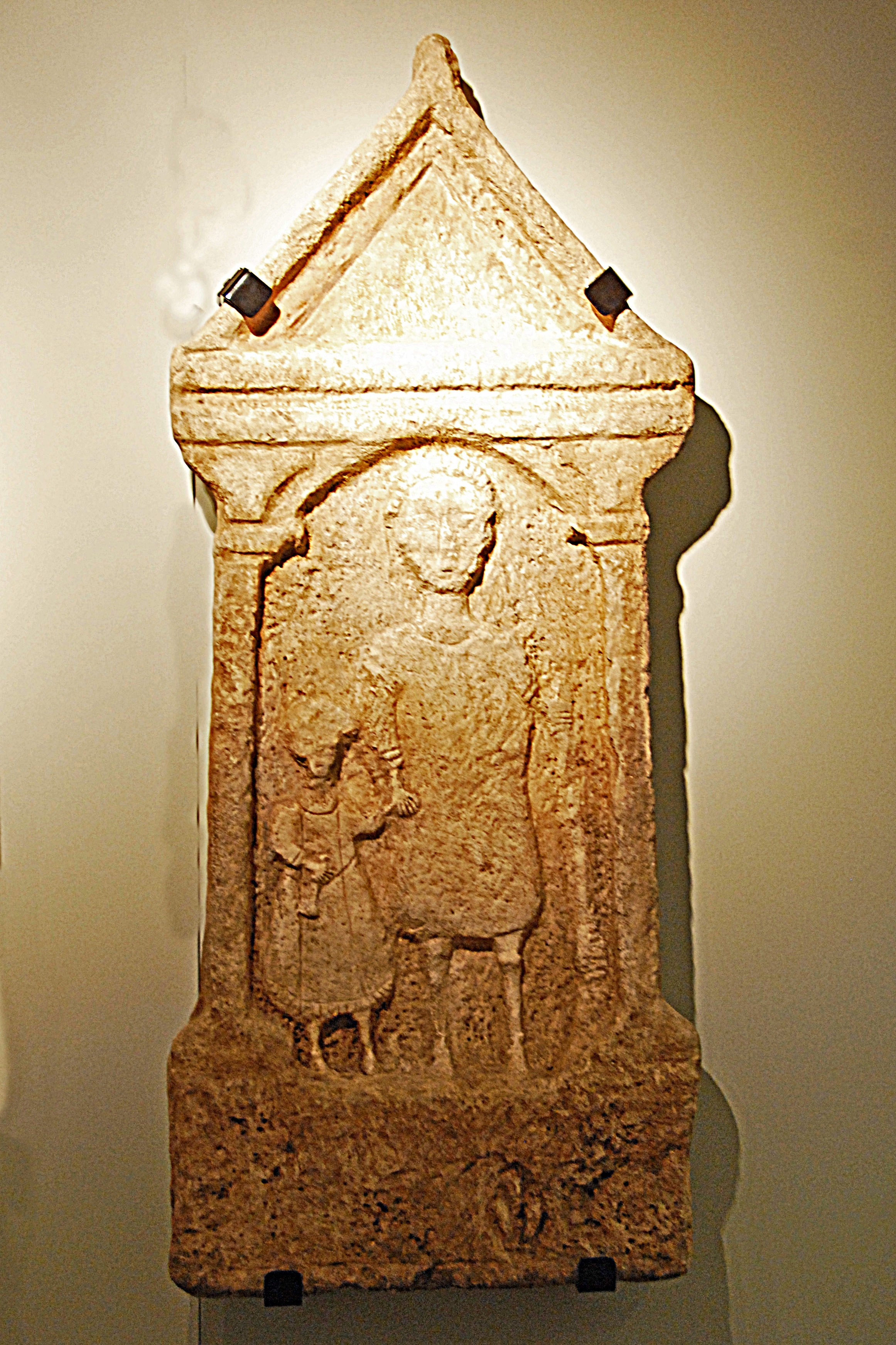 Civaux, Museum, Grabstele, 3.-4. Jh.